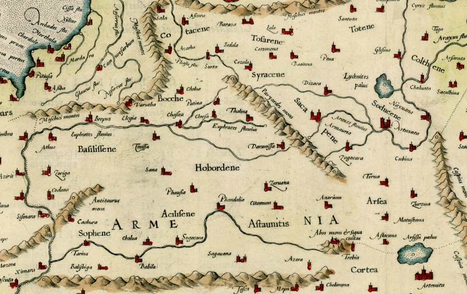 Tabula Asiae III [Armenia, Georgia, Turkey, etc.]